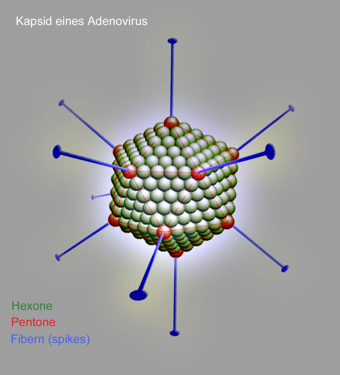 Schematischer Aufbau des Kapsids eines Adenovirus